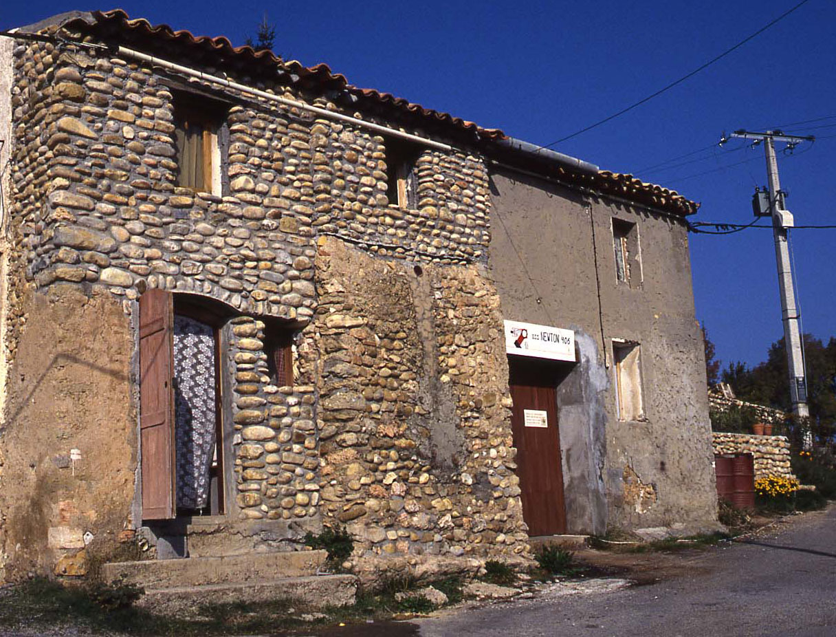 "La Remise" in Puimichel, France